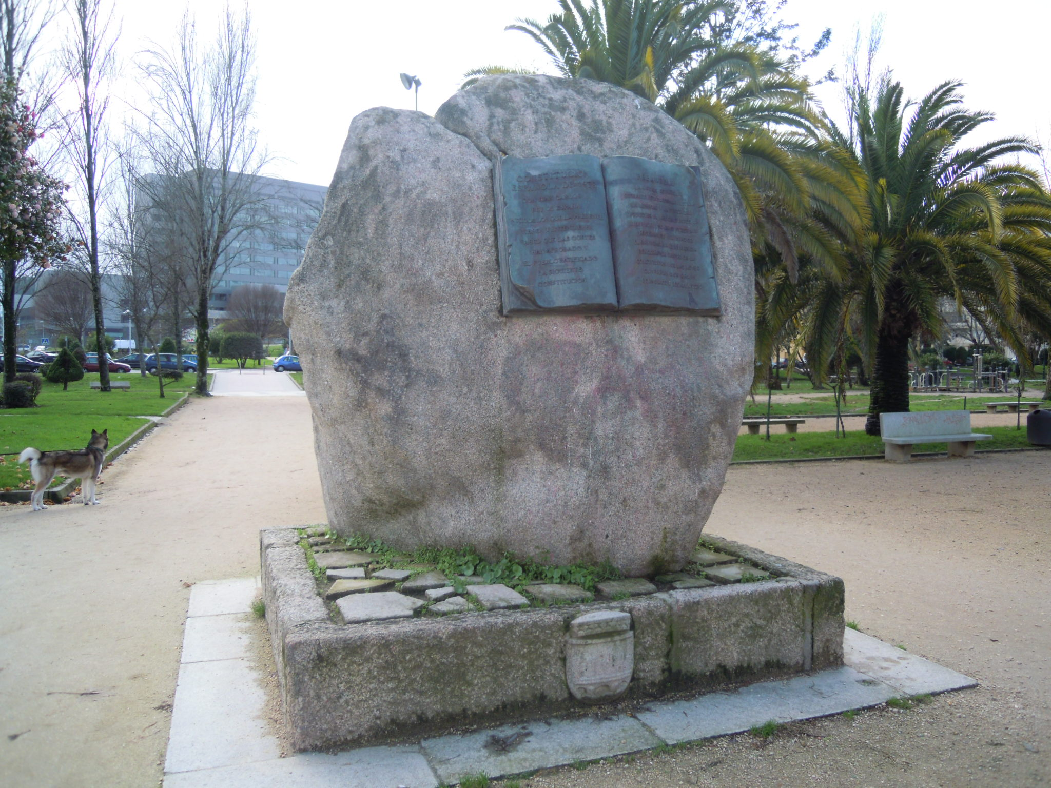 Praza da Constitución de Pontevedra